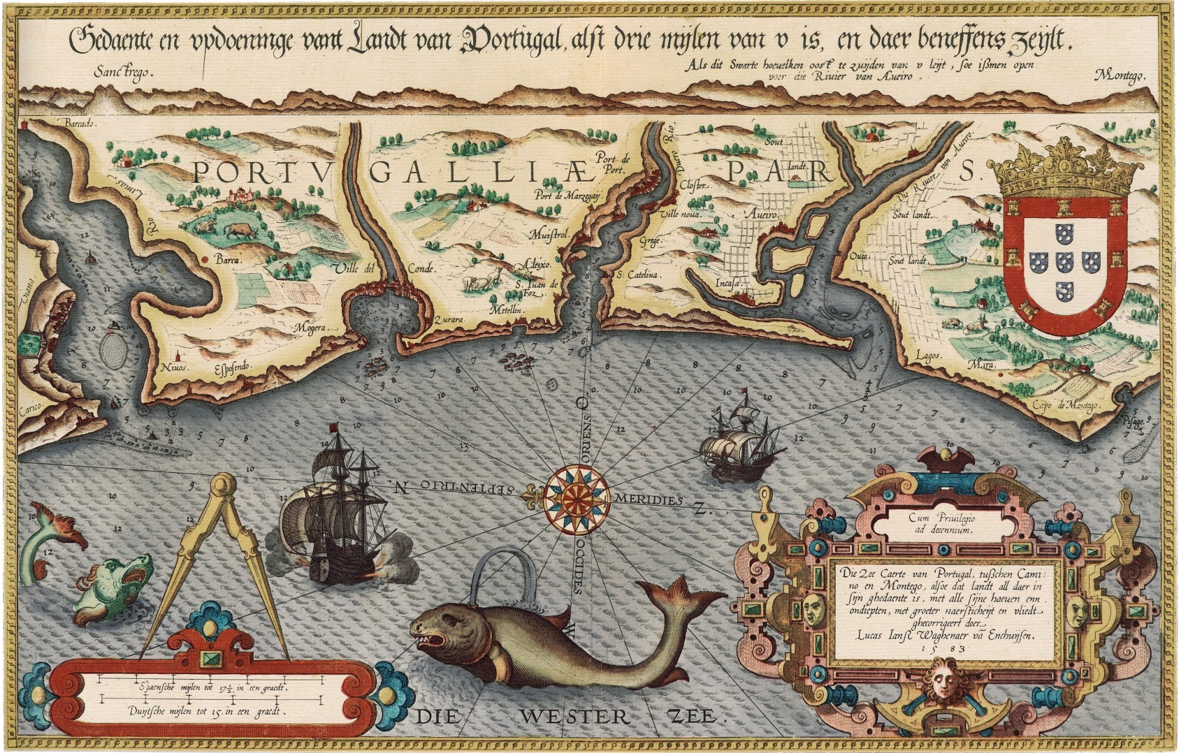 Sea map of Portugal; title: Gedaente en ... vant Landt van Portugal; from: Mariner’s Mirror (T'eerste deel vande Spieghel der zeevaerdt, van de navigatie der Westersche zee, innehoudende alle de custen van Vranckrijck, Spaingen ende 't principaelste deel van Engelandt, in diversche zee caerten begrepen", Leiden, Christoffel Plantijn, 1584)